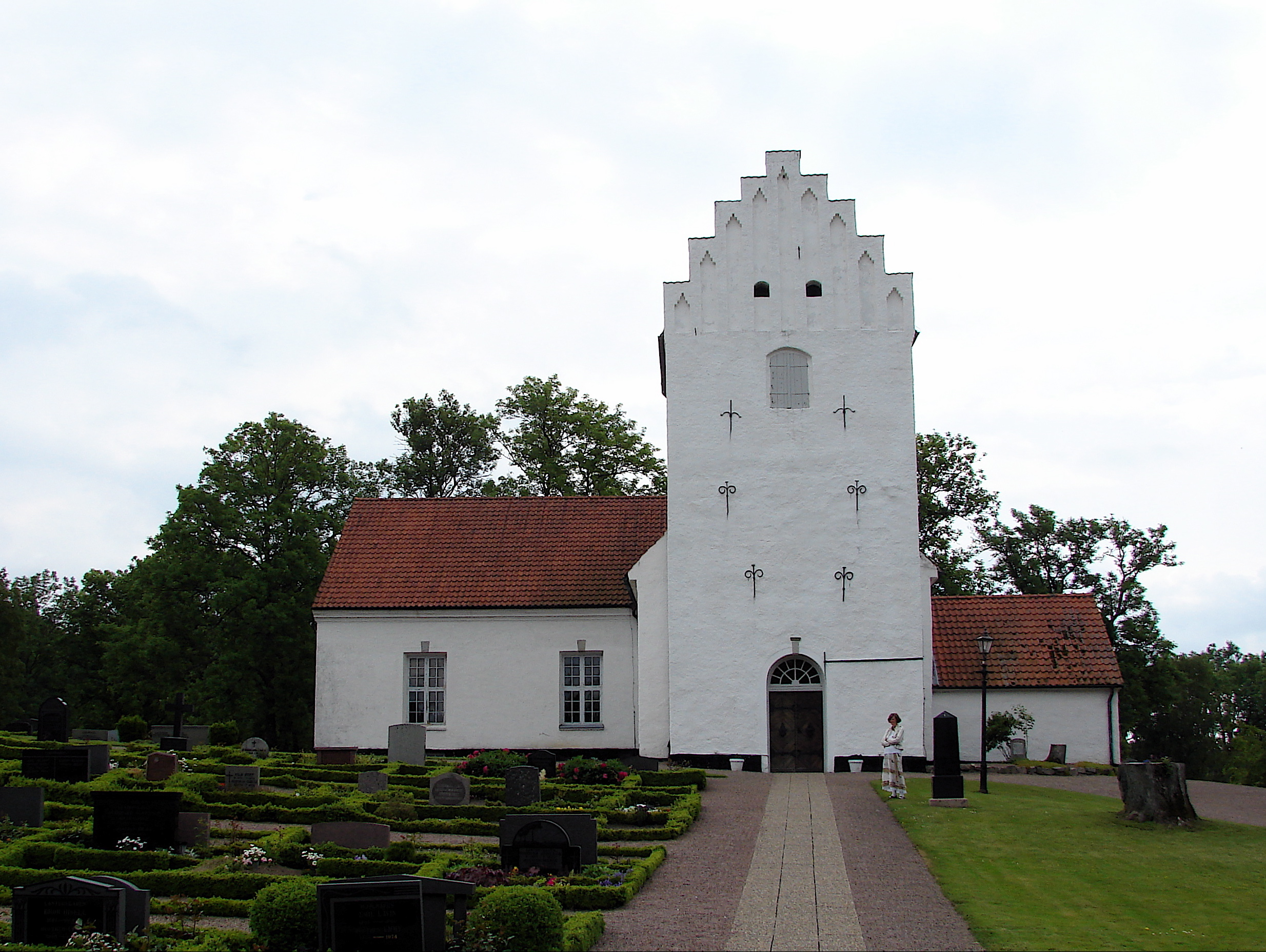 Kågerød kirke